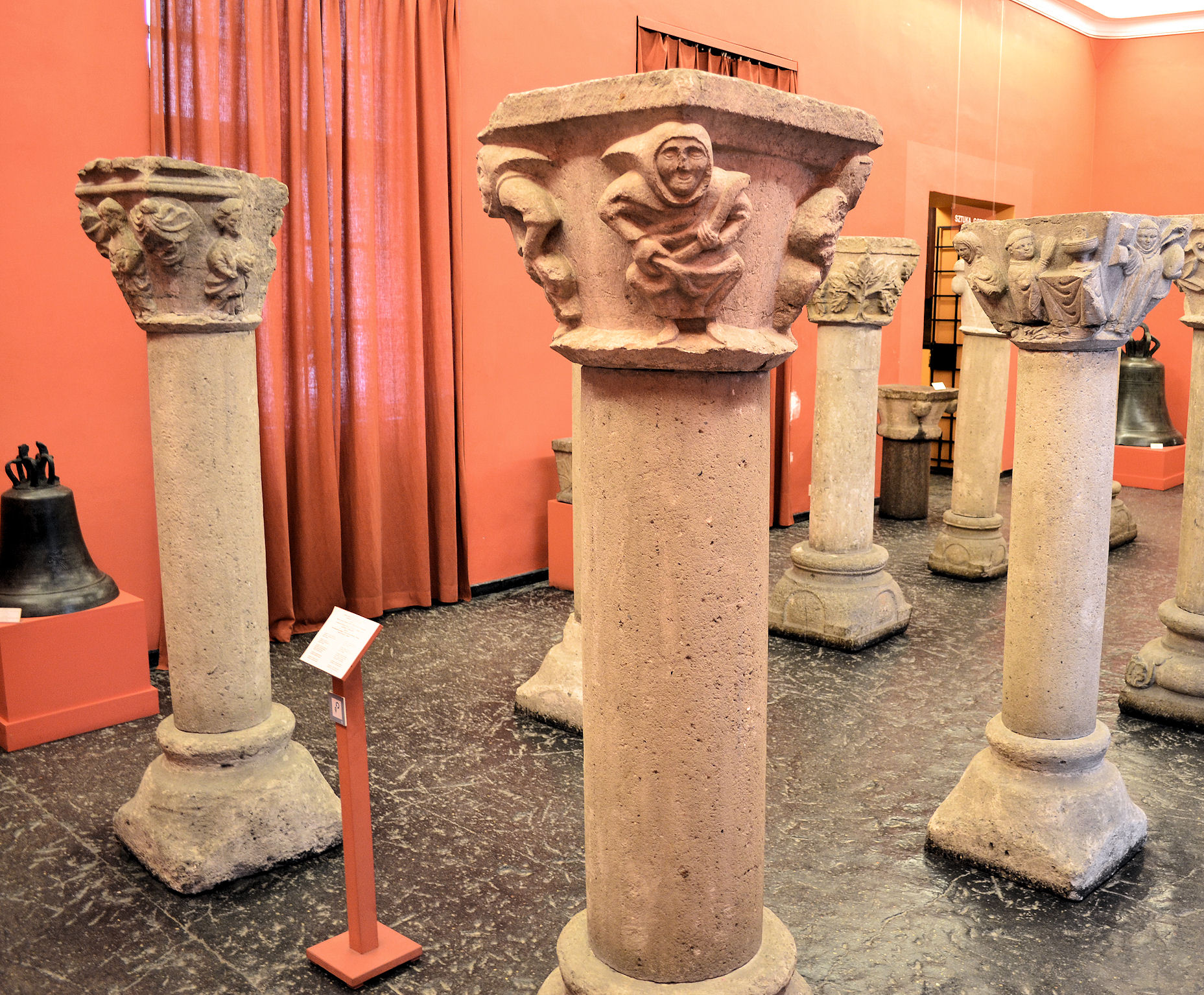 Kolumny z klasztoru w Kołbaczu (obecnie w Muzeum Narodowym w Szczecinie